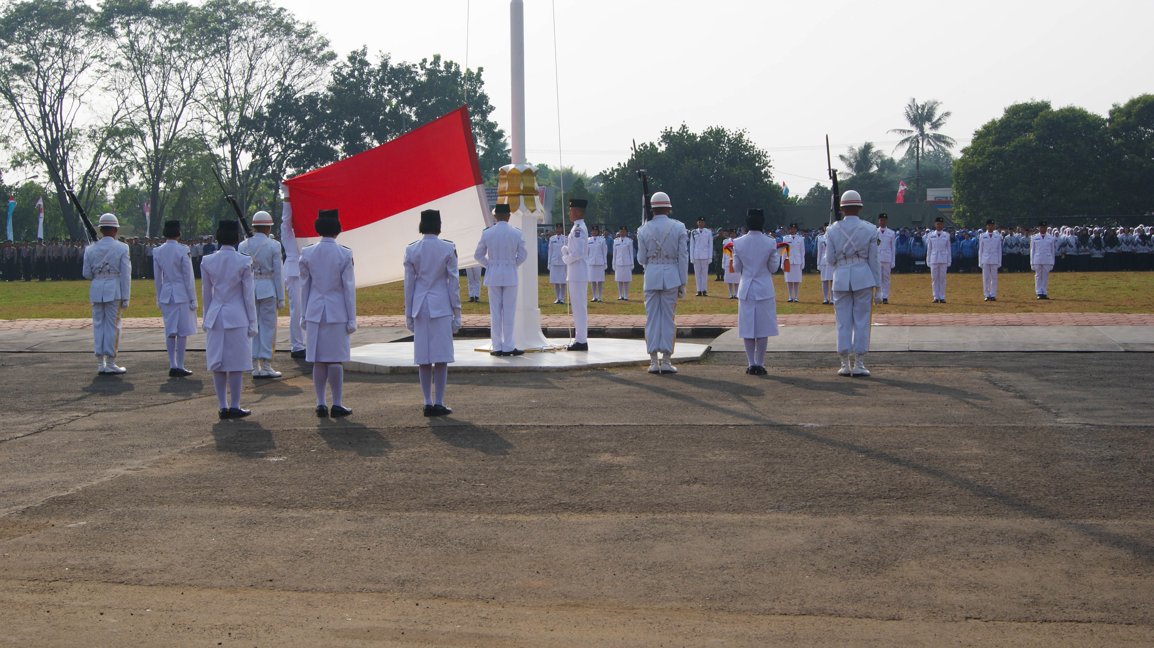 PENGIBARAN SANG MERAH PUTIH oleh pasukan 8 membentuk formasi khusus